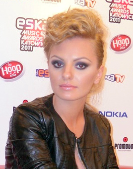 Alexandra Stan Zdjęcie zrobione podczas Eska Music Awards 2011 w katowickim Spodku.